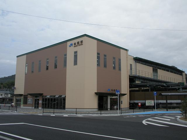 本郷駅の新駅舎